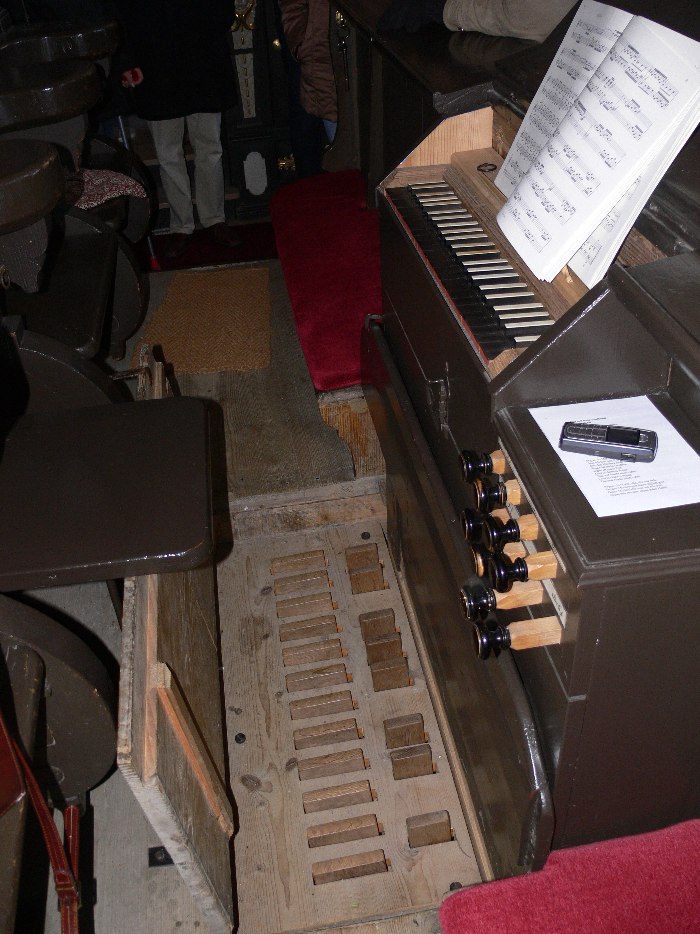 Pfarrkirche (ehem. Stiftskirche) St. Maria, Schloss Zeil, Leutkirch im Allgäu Spieltisch der Chororgel (von Daniel Hayl, um 1609)